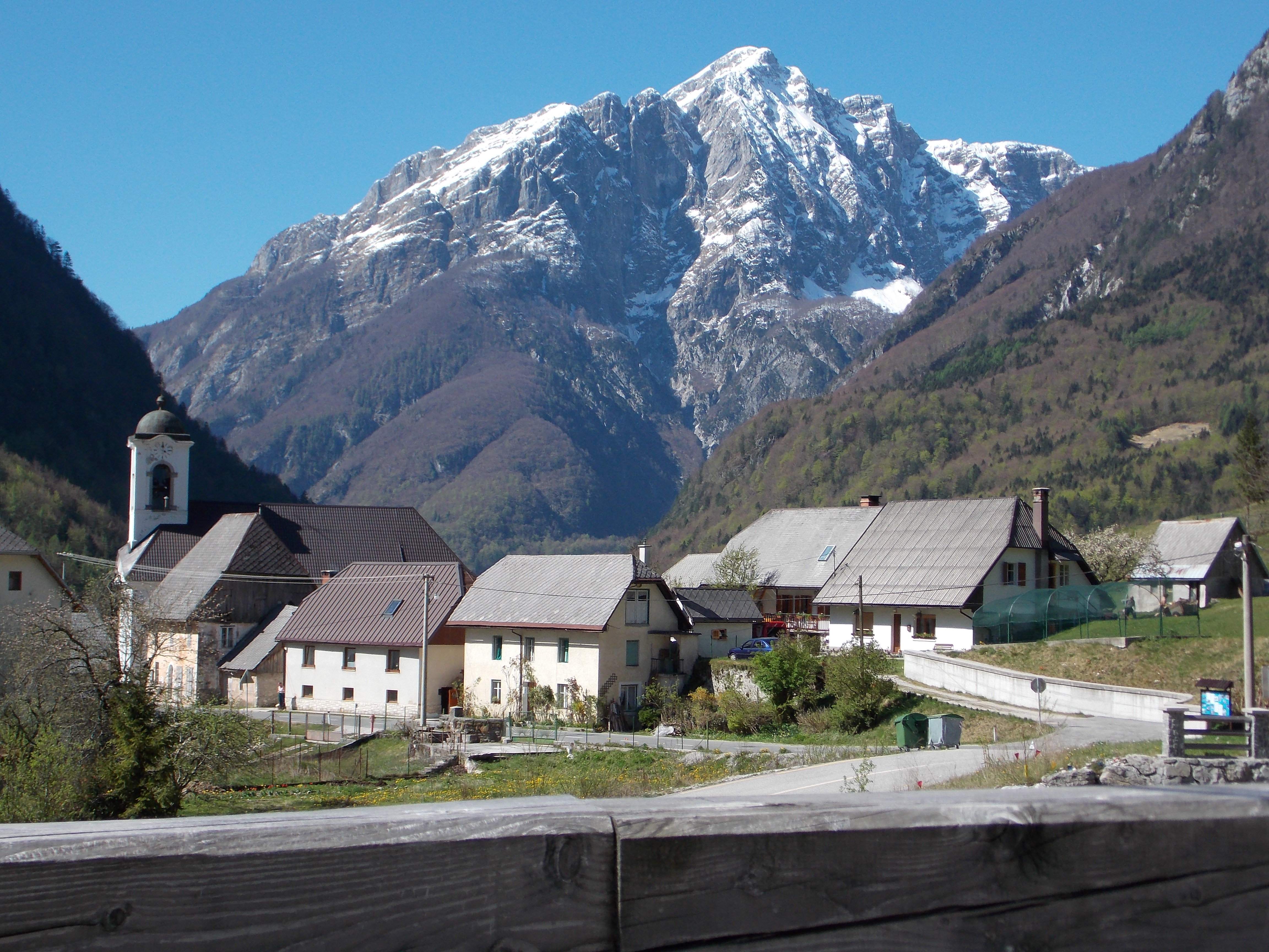 Log pod Mangartom iz Koritnice